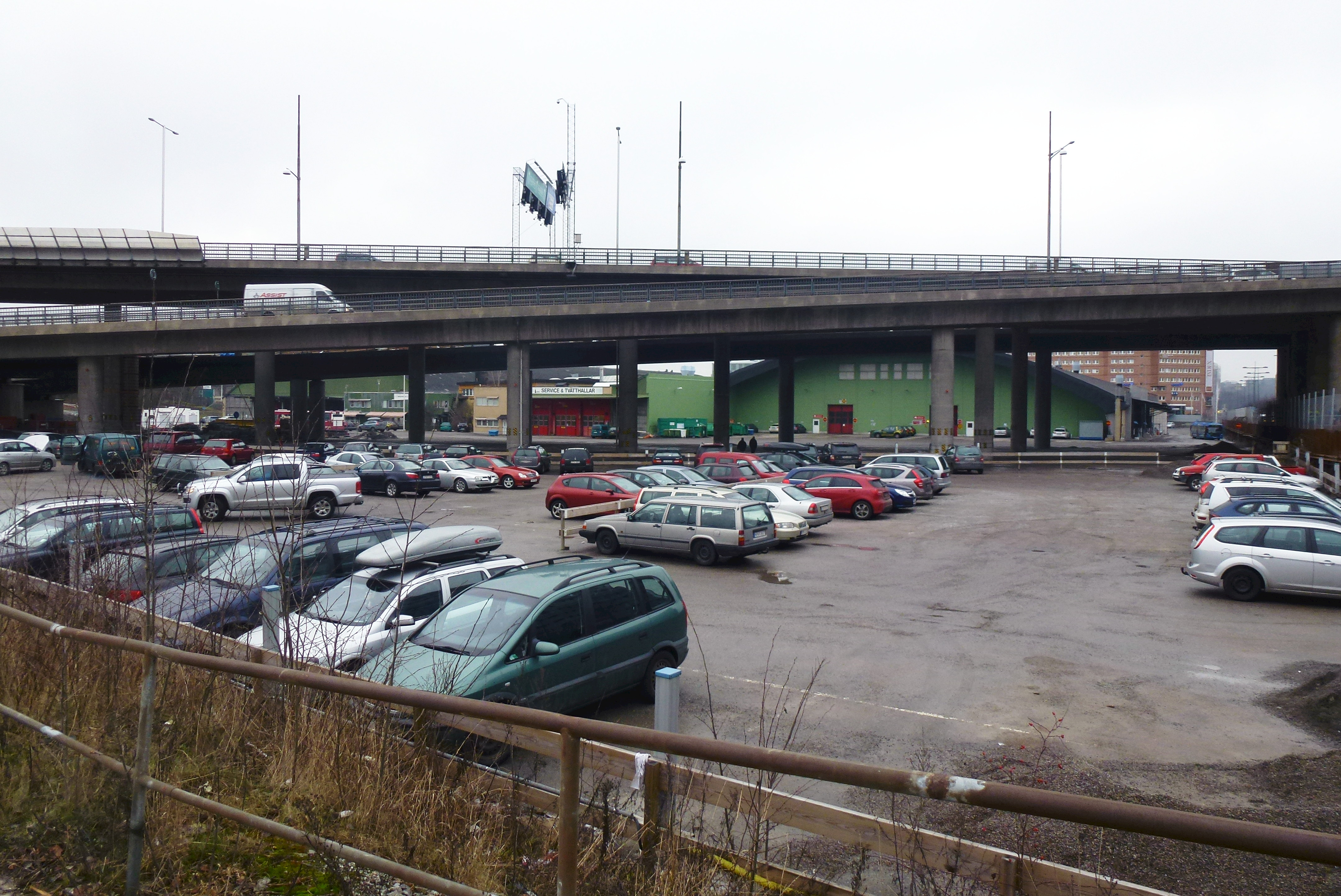 Kristinebergs slott 11 mm (Samverkanscentralen) även kallad "Blåljushuset"